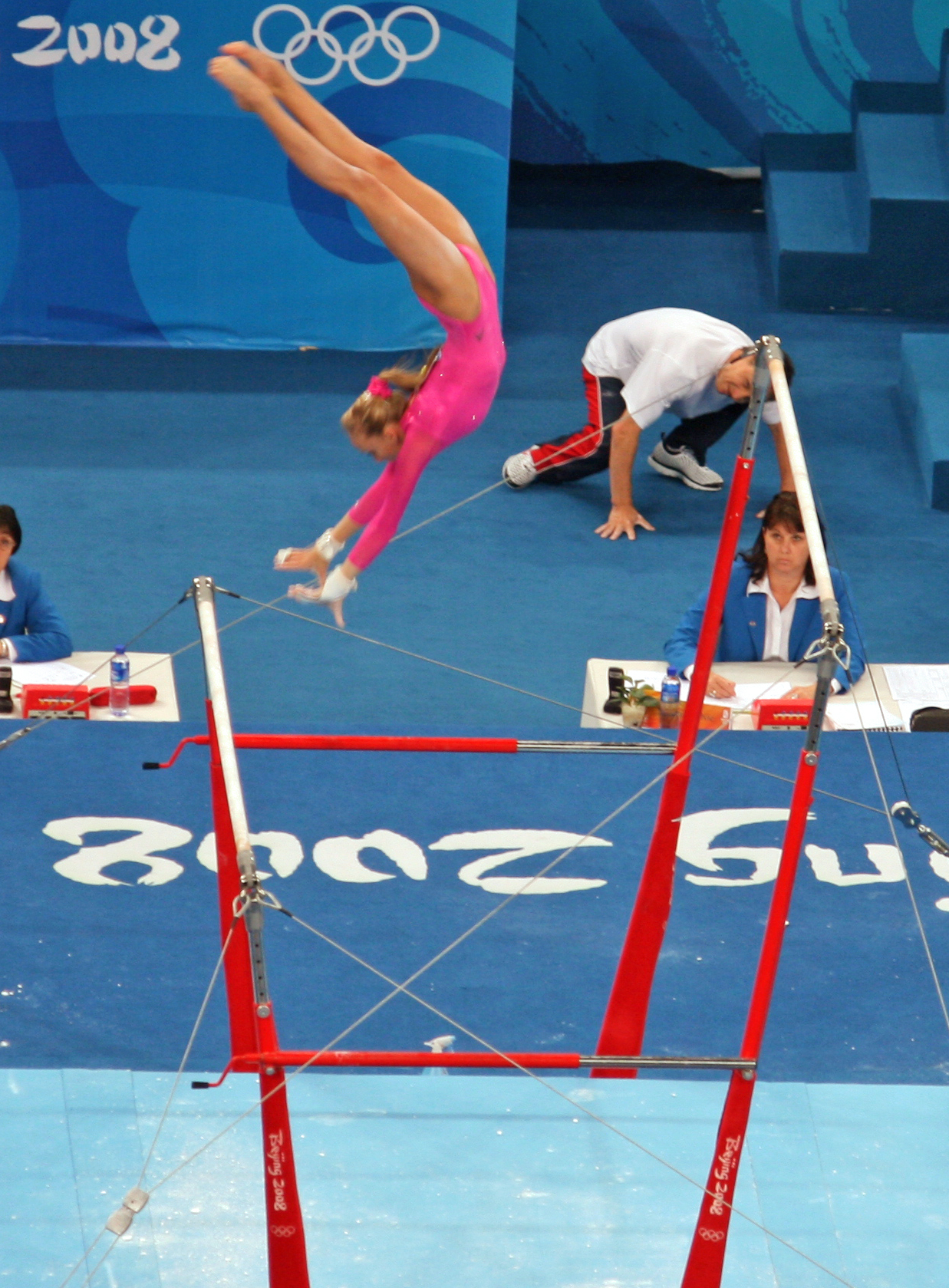 Salto Pak, Nastia Liukin